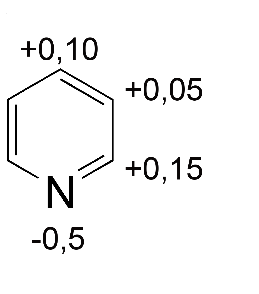 Elektronendichteverteilung im Pyridin